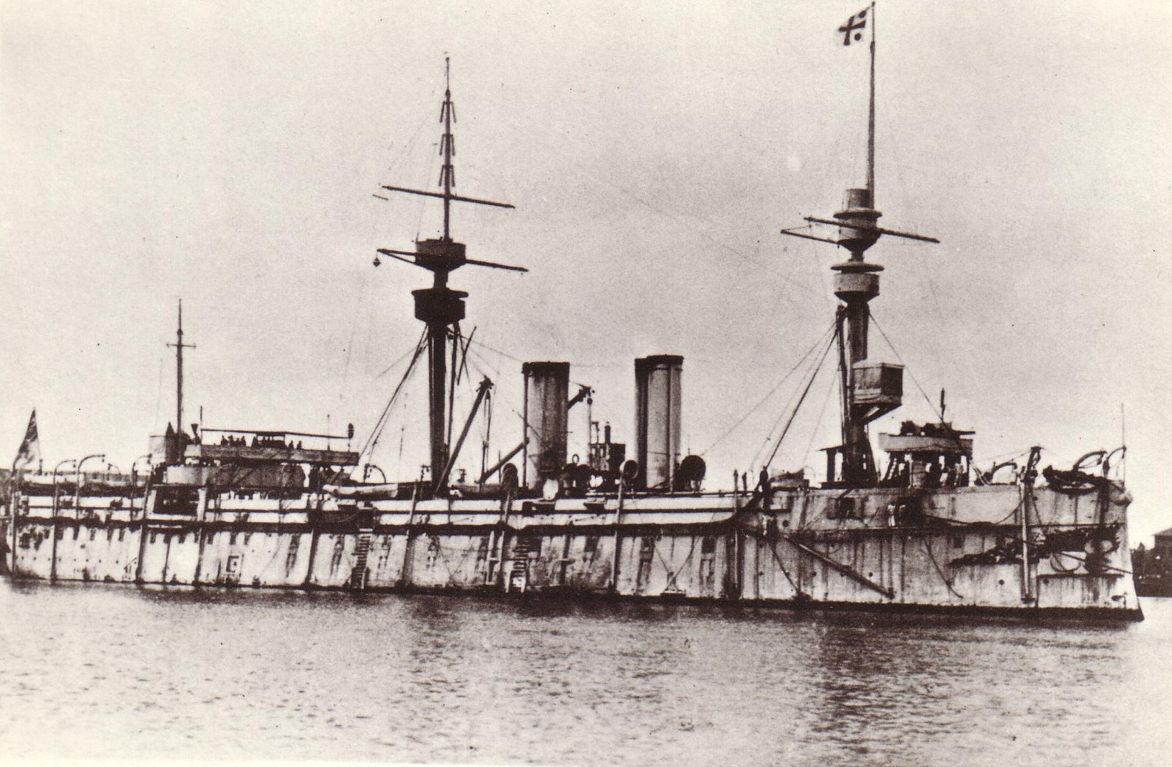 Panzerfregatte "König Wilhelm" (9.750 t), 1867 in Dienst gestellt, später großer Kreuzer, Wohn- und Exerzierschiff für Schiffsjungen in Kiel und Mürwik, 1921 abgewrackt.